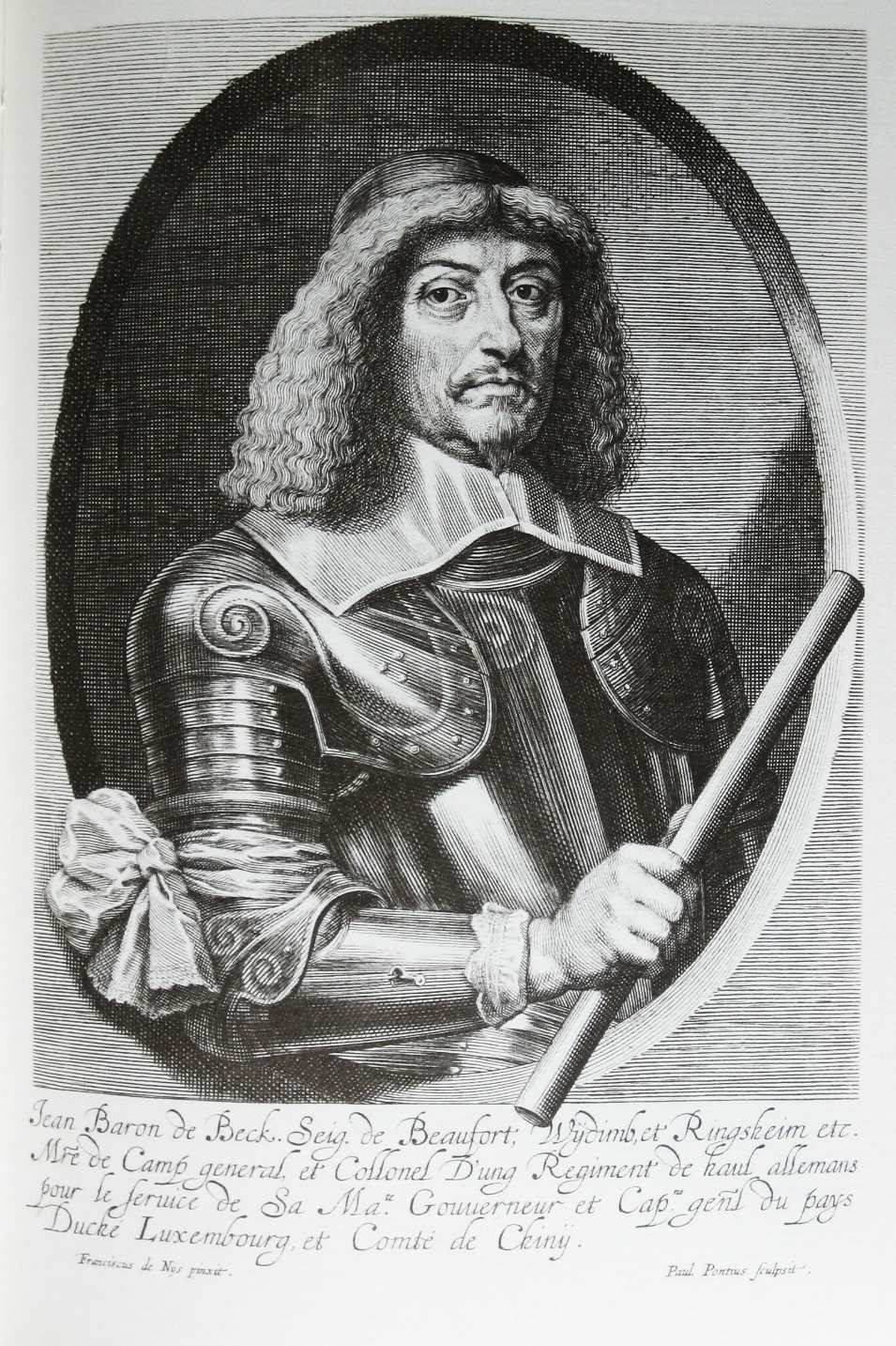 Freiherr Johann von Beck. Kupferstich, 22,5 x 15,4 cm. Inscription: Jean Baron de Beck. Seigr. de Beaufort, Wÿdimb, et Ringsheim etc. / Mre de Camp general, et Collonel D'ung Regiment de haut allemans / pour le seruice de Sa Mate. Gouuerneur et Capne. genl du pays / Duché Luxembourg et Comté de Chinÿ.